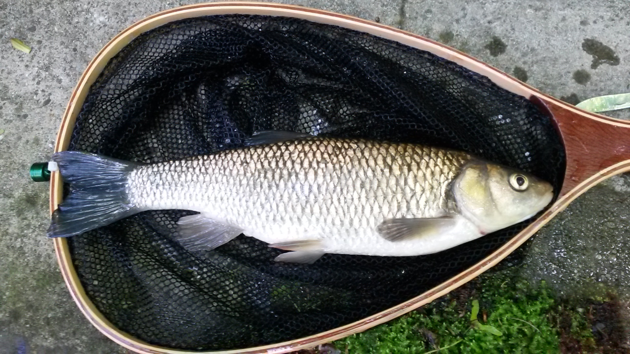 Aitel mit der Angel gefangen.